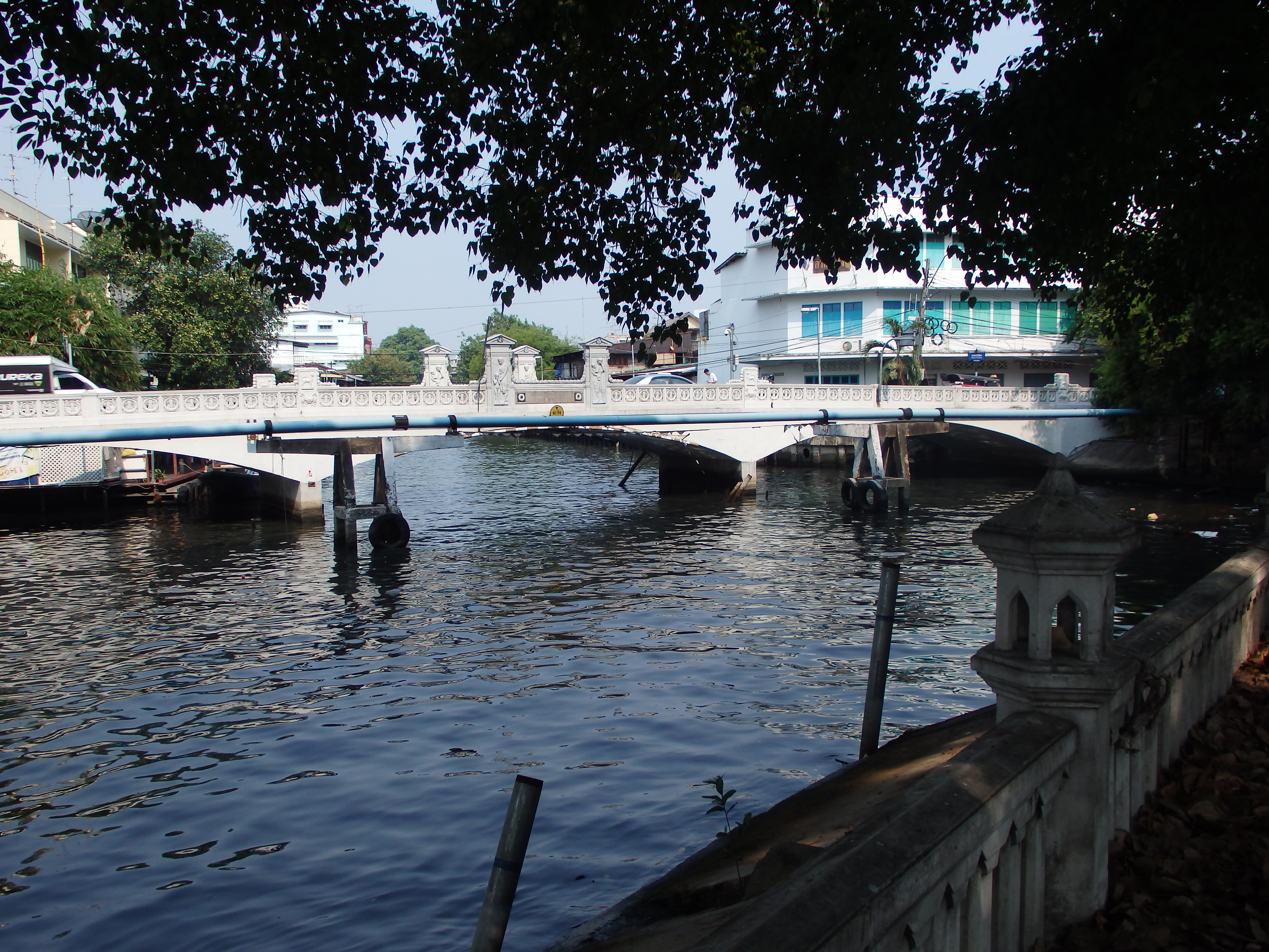 Canal